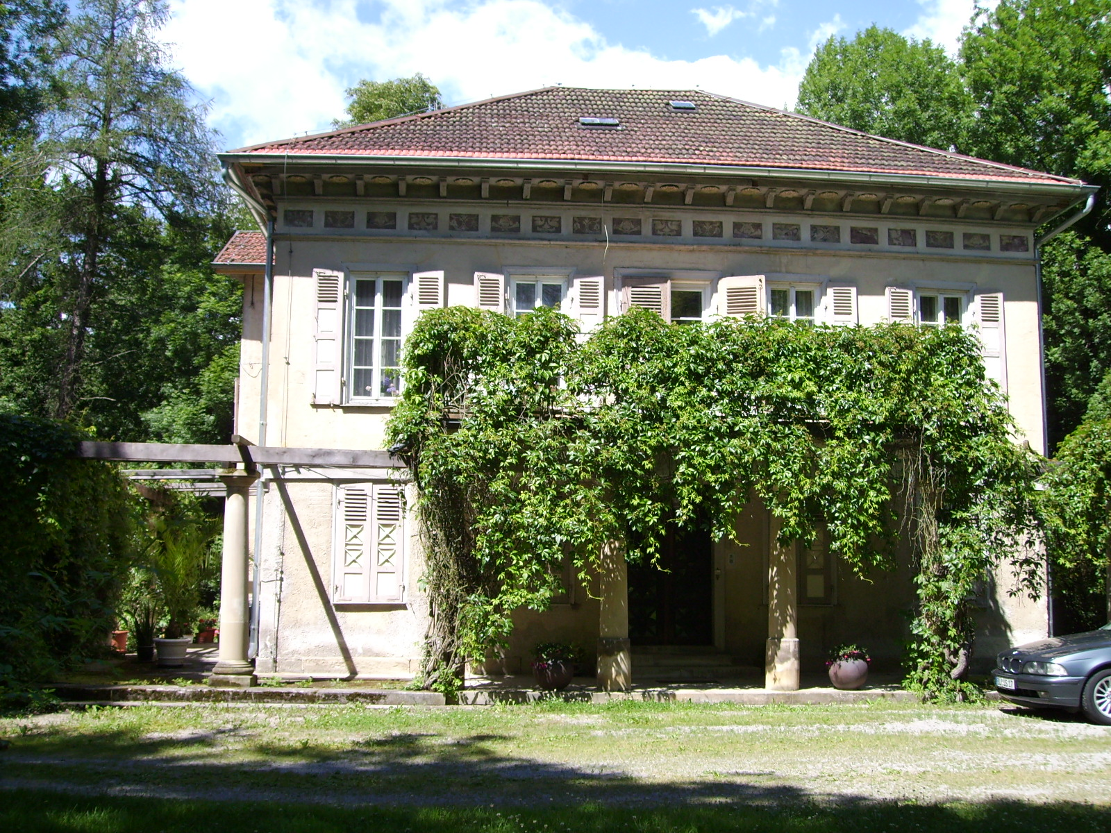 Villa Silberburg (Hechingen), Germany